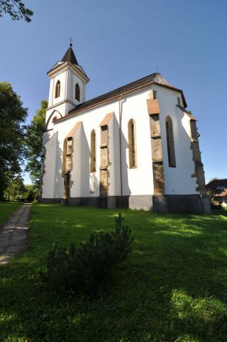 Kostol